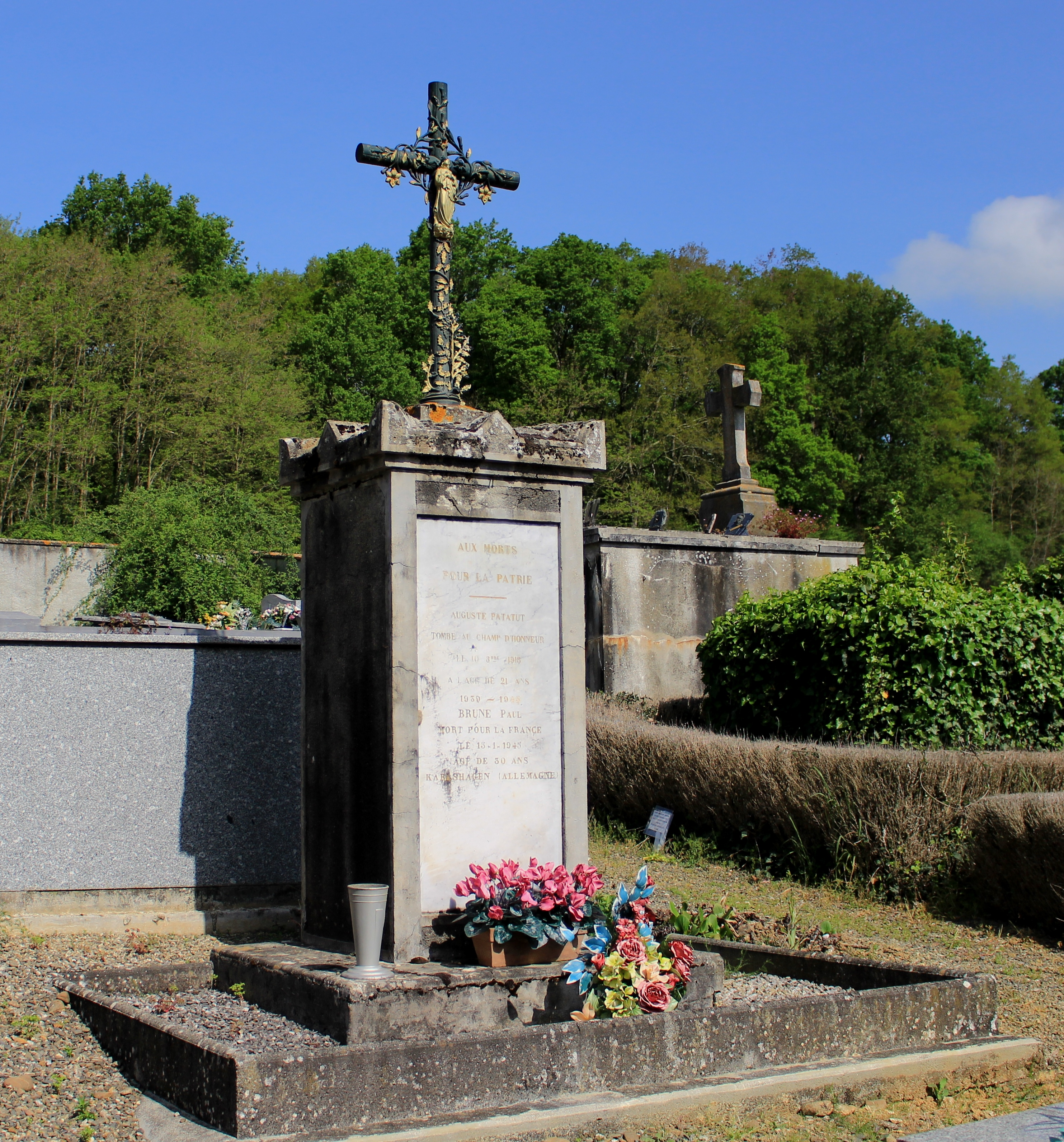 Monument aux morts de Sanous (Hautes-Pyrénées)